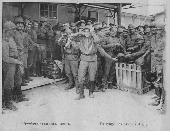 Русский экспедиционный корпус. Фотоальбом. Описание - на фотографии